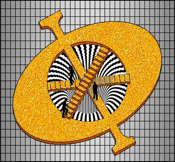 Dibujo sobre un diseño para un parque